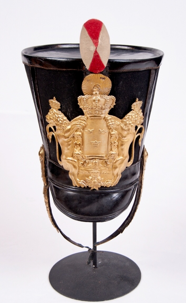 Tillhör Armémuseums samlingar.